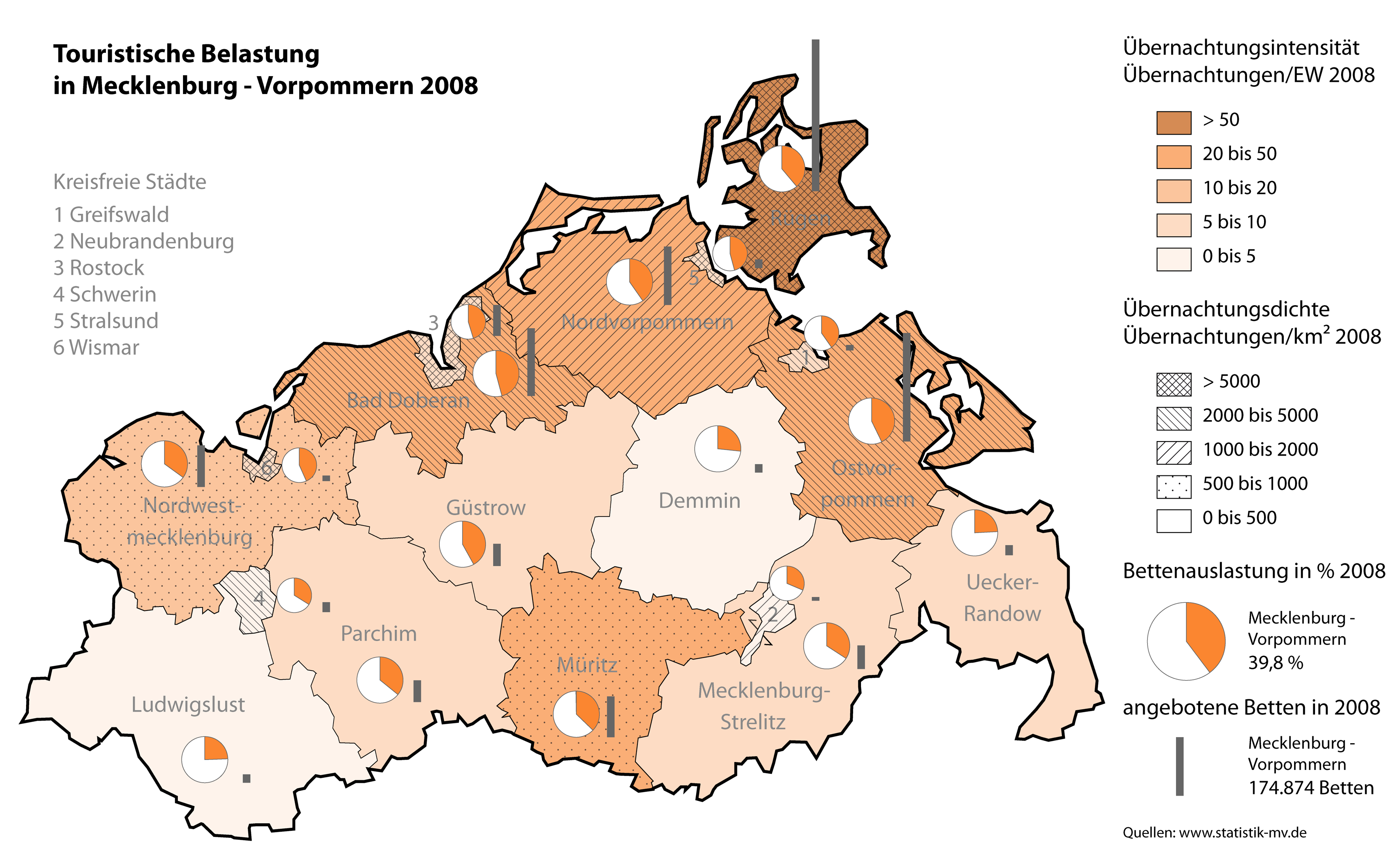 Tourismus in MV